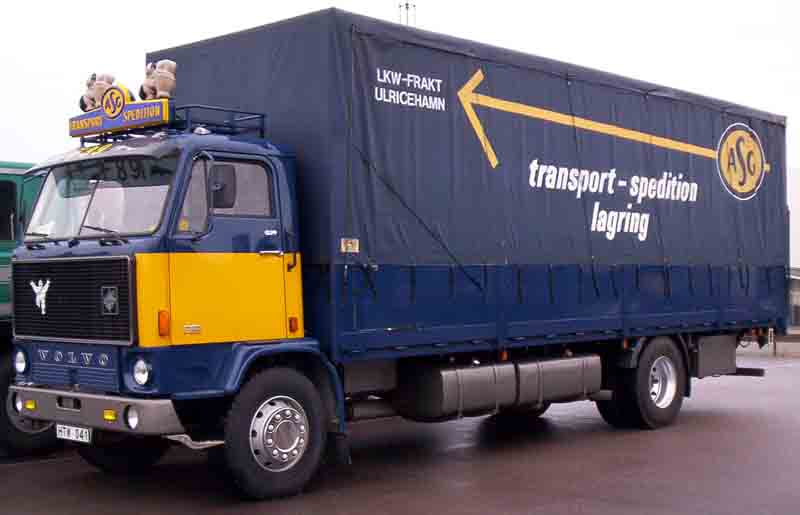 Volvo F89 Truck 1974